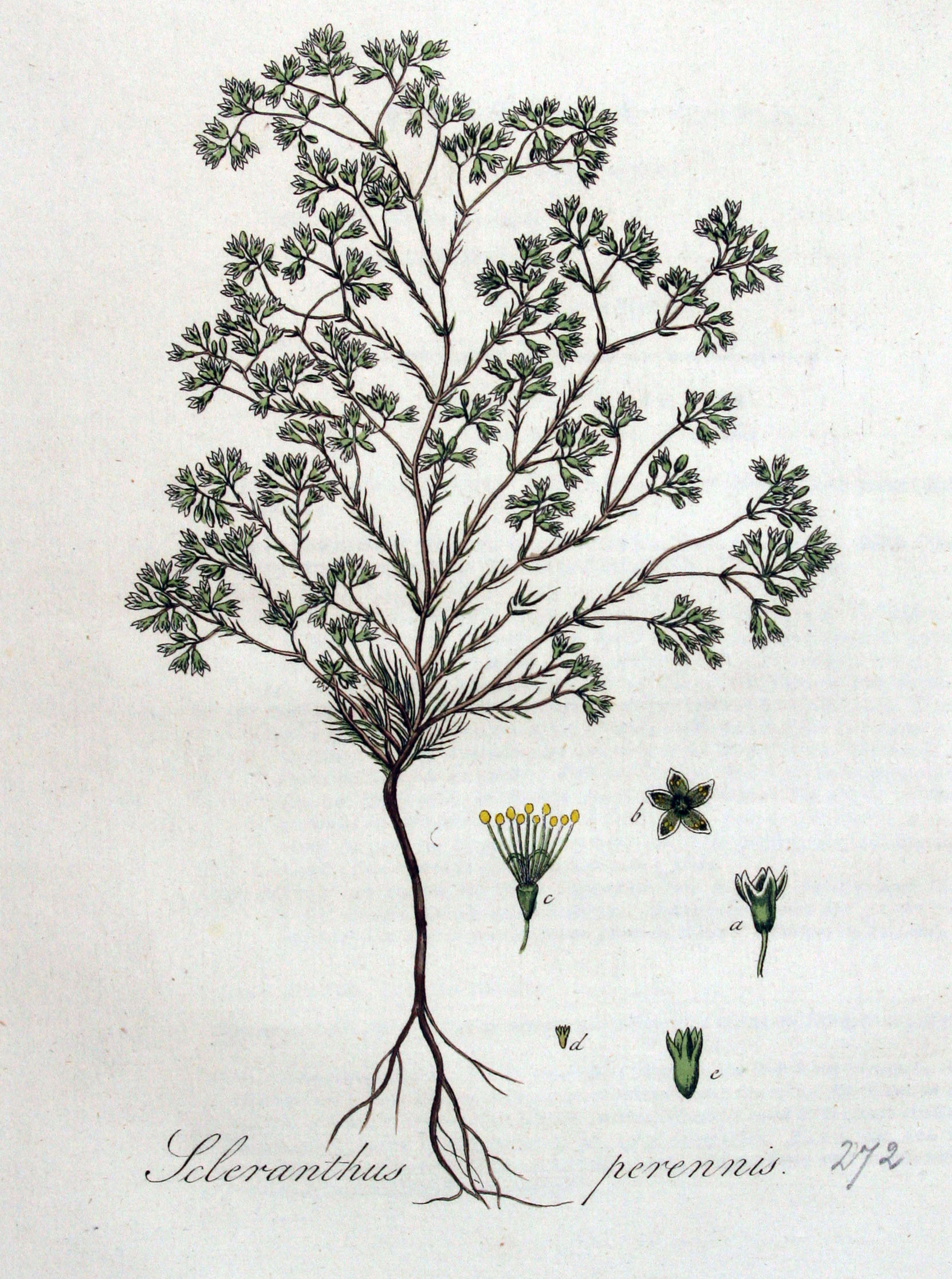 Scleranthus perennis L.